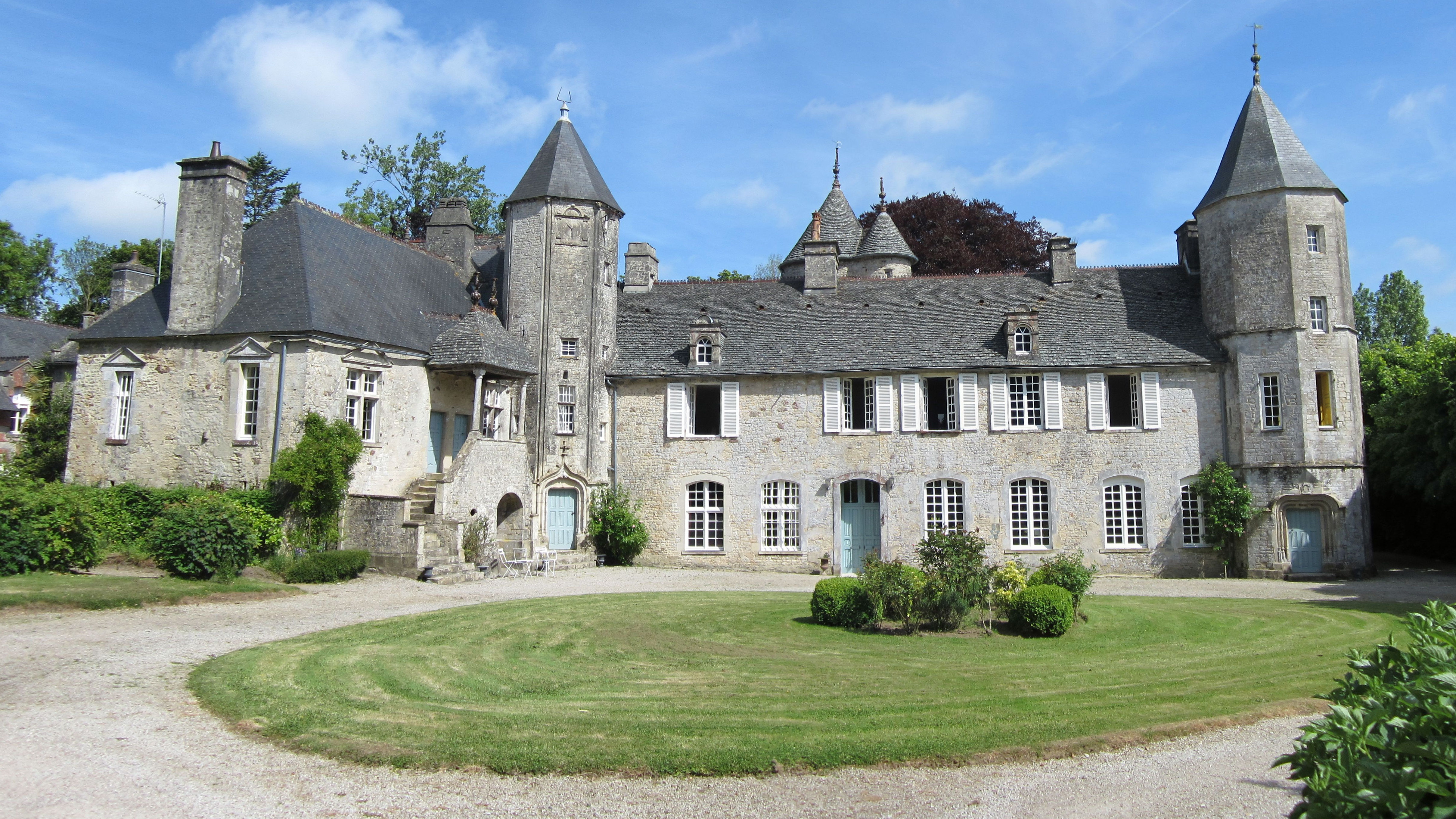 Manoir de la Cour de Flottemanville-Bocage, Manche .